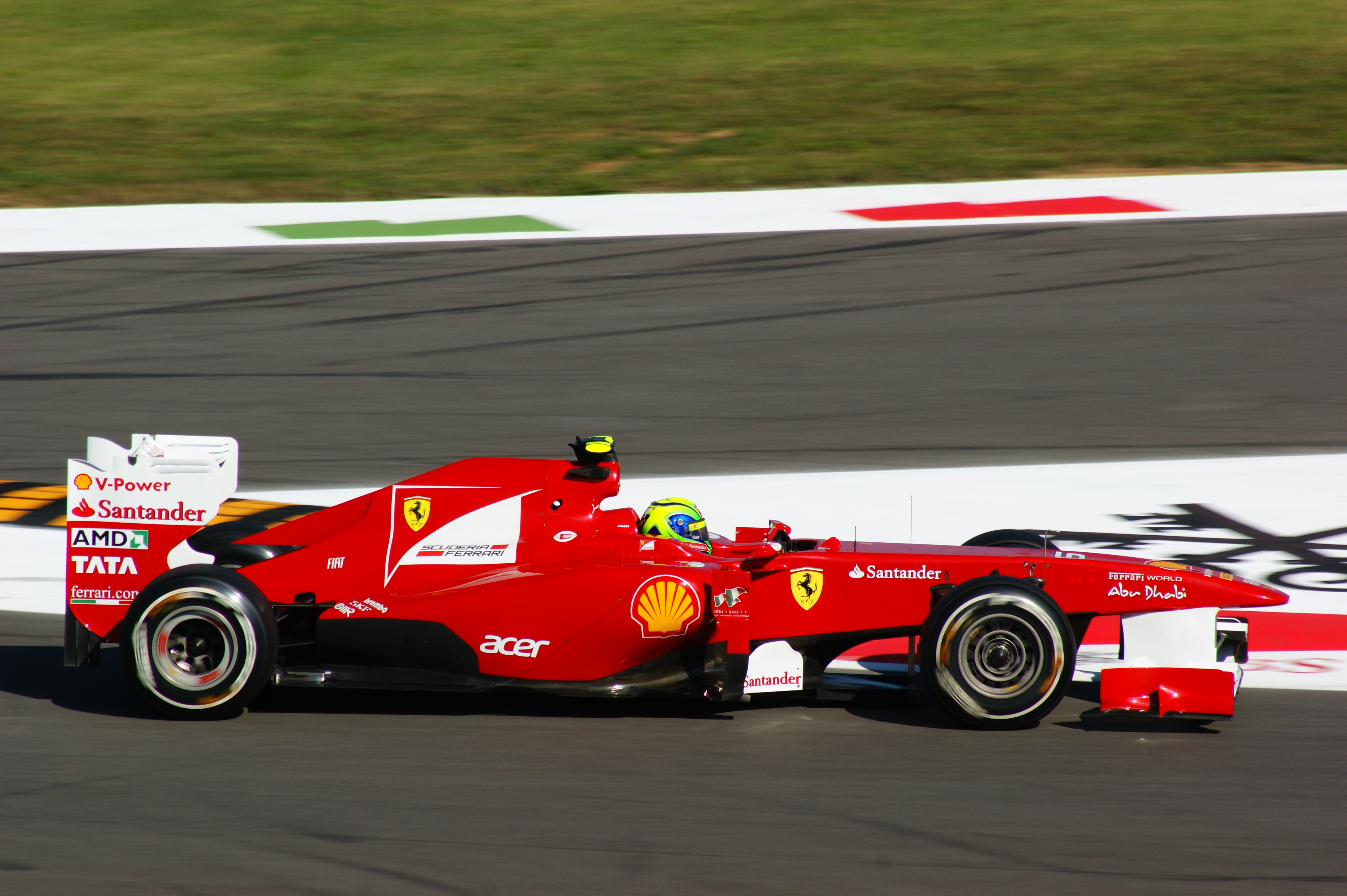 Felipe Massa alla prima variante Monza 2011